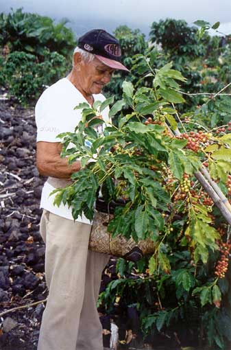 Kona-Kaffee, Kaffeepflücker (Hawaii (Big Island))